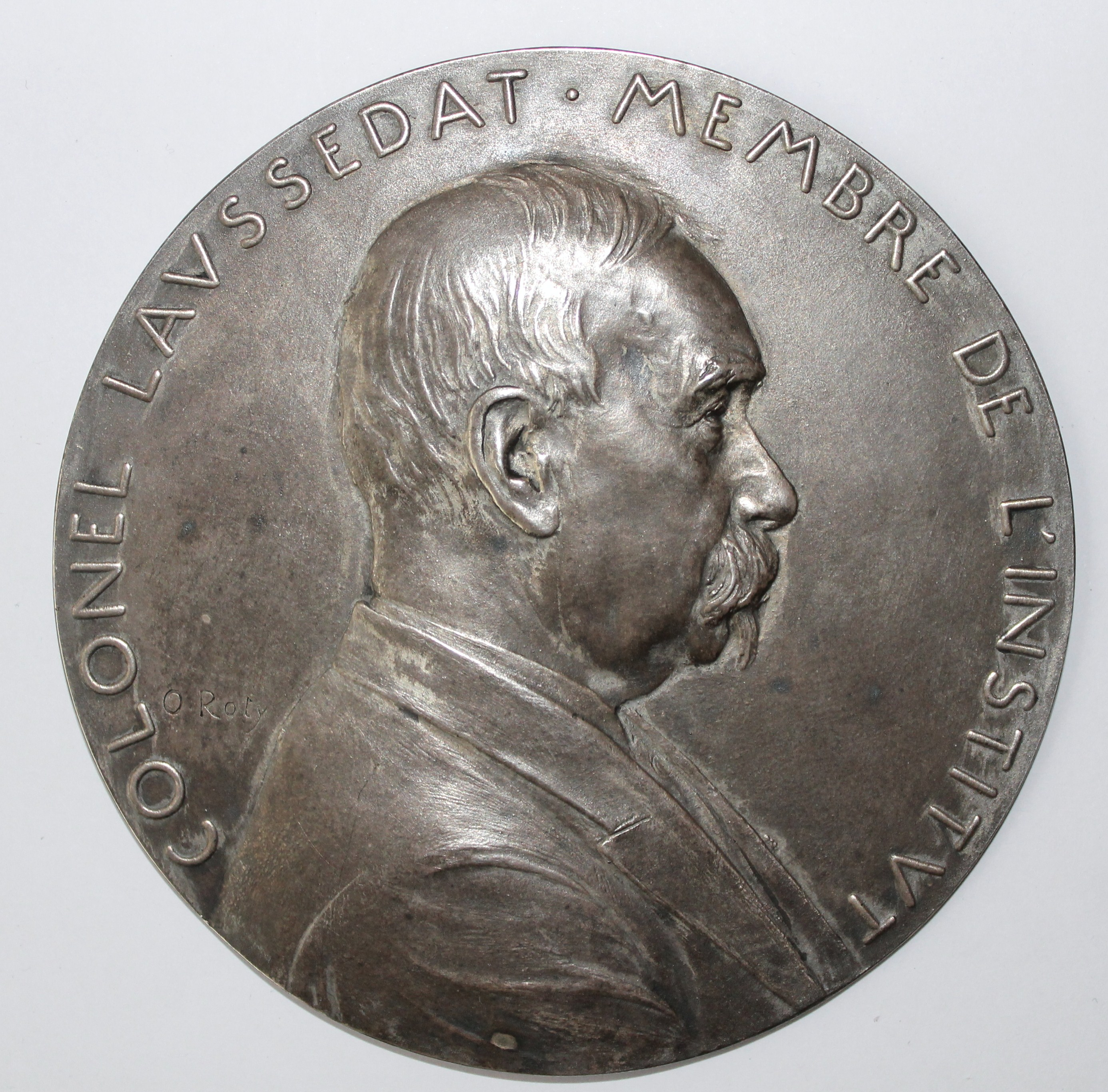 Médaille fondue (118 mm) du colonel Laussedat, membre de l'Institut par Oscar Roty en 1896.